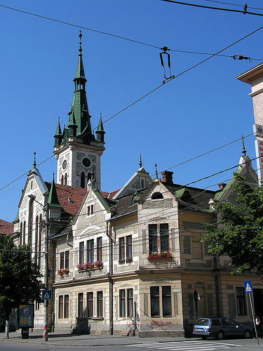 Cluj-Napoca, Biserica Reformată-Calvină, str.Horea nr.53